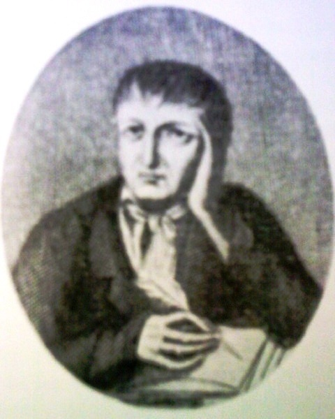 foto di una stampa del XIX sec. raffigurante Andrea Mazzarella